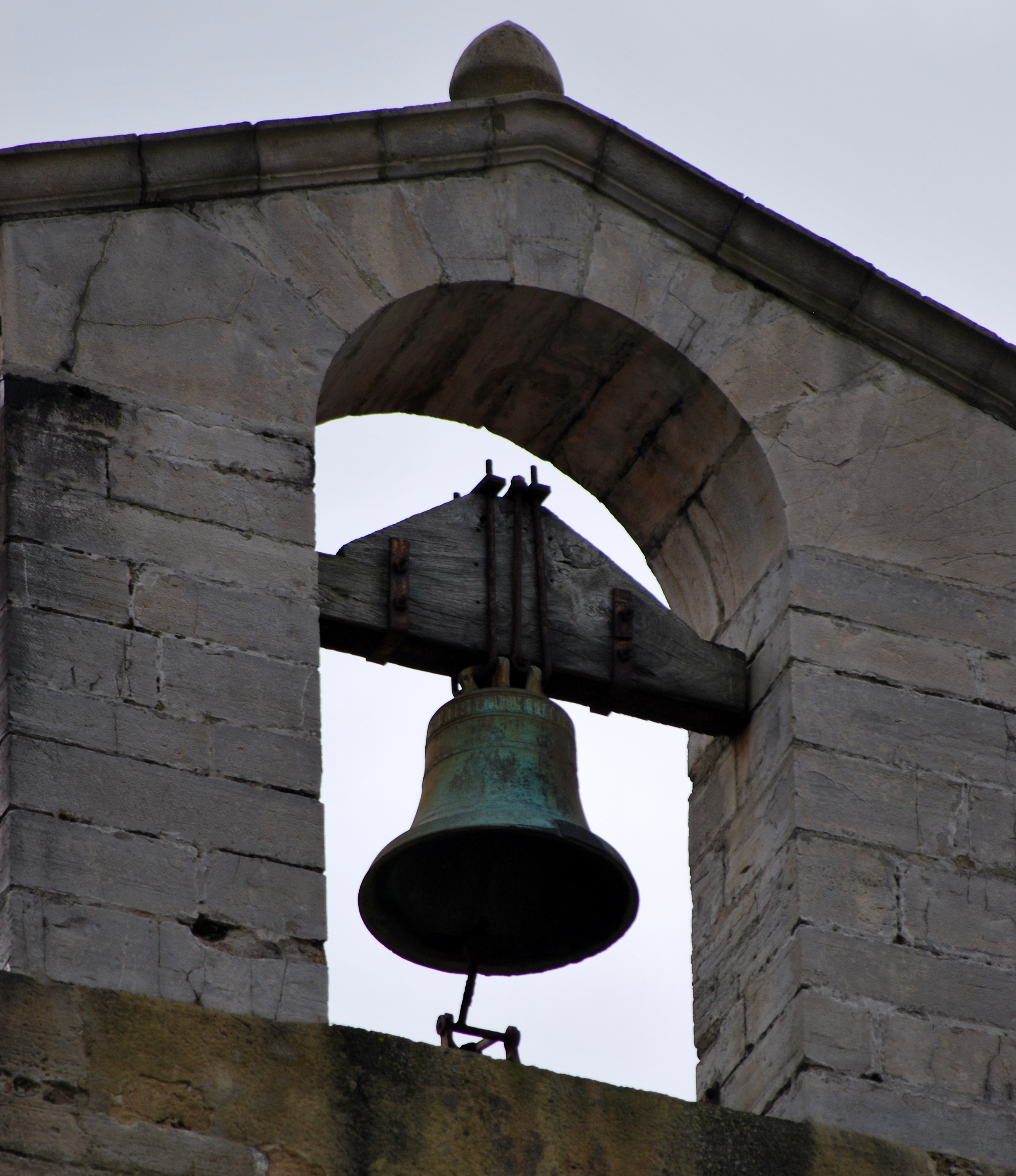 Capbreton église St Nicolas